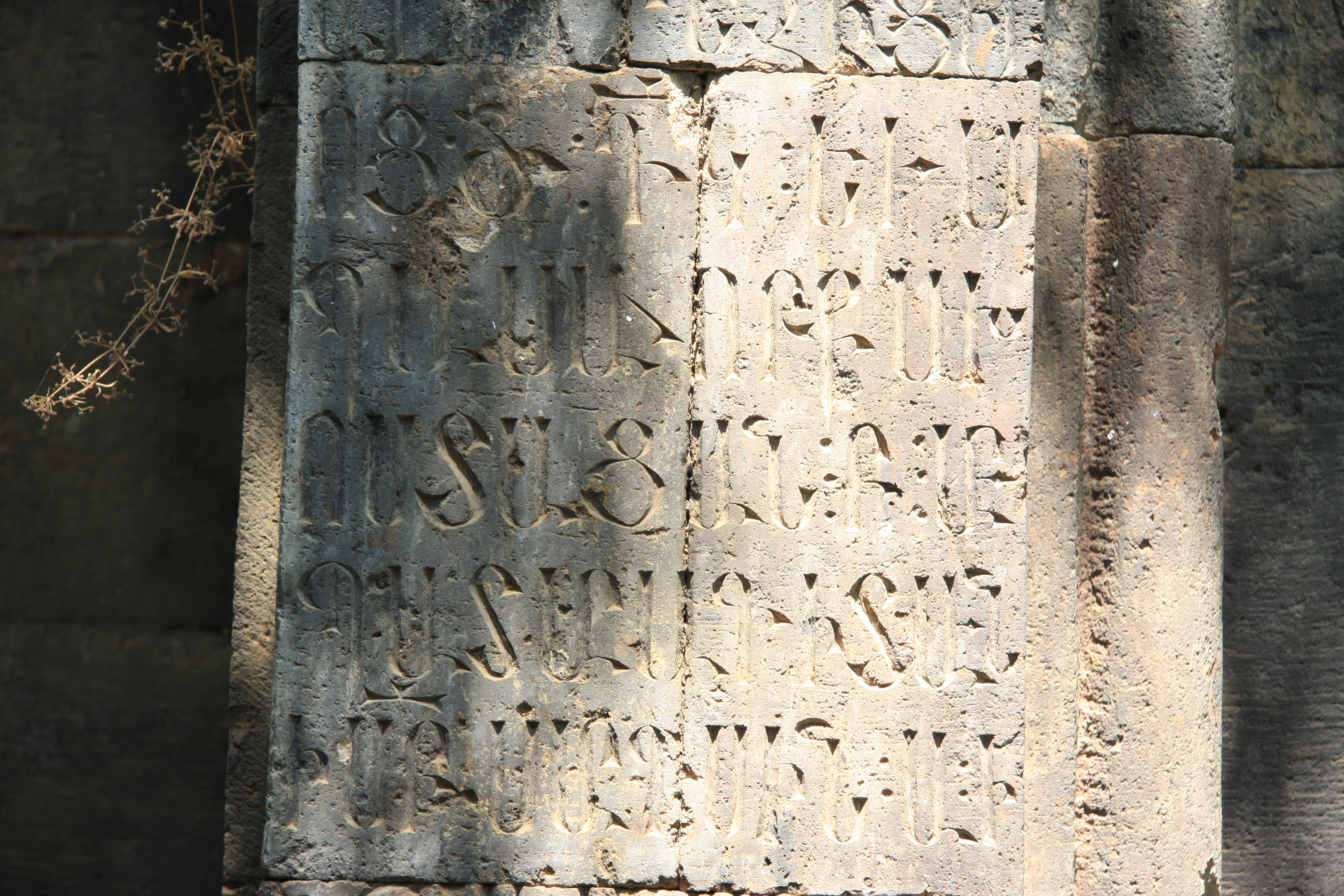 Եկեղեցական համալիր «Գհուկի վանք» (Բոլորահար) 15/6